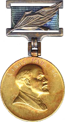 Медаль лауреата Международной Ленинской премии «За укрепление мира между народами»